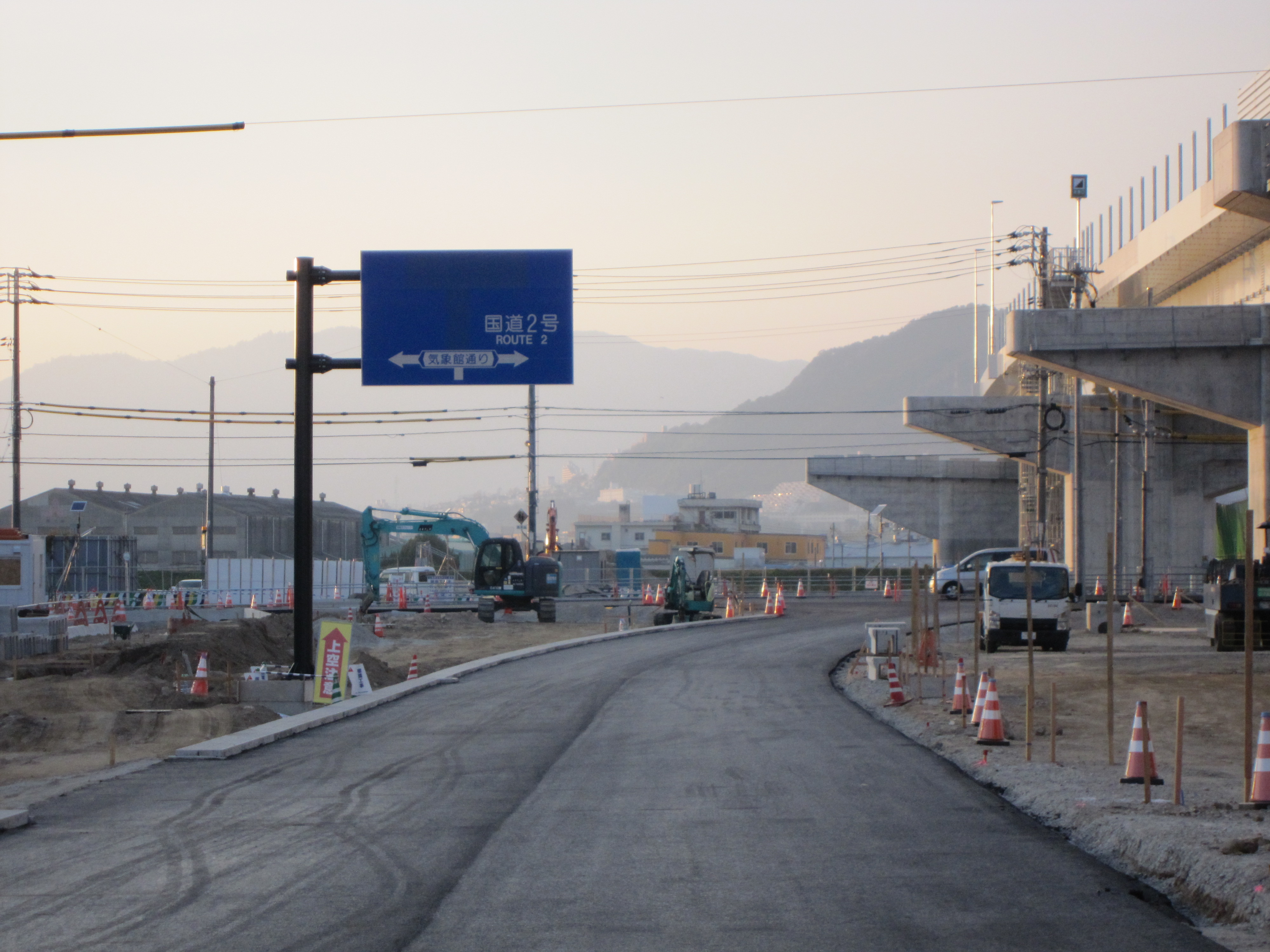 建設中の広島南道路・広島高速３号線中区江波地区。観音方面。